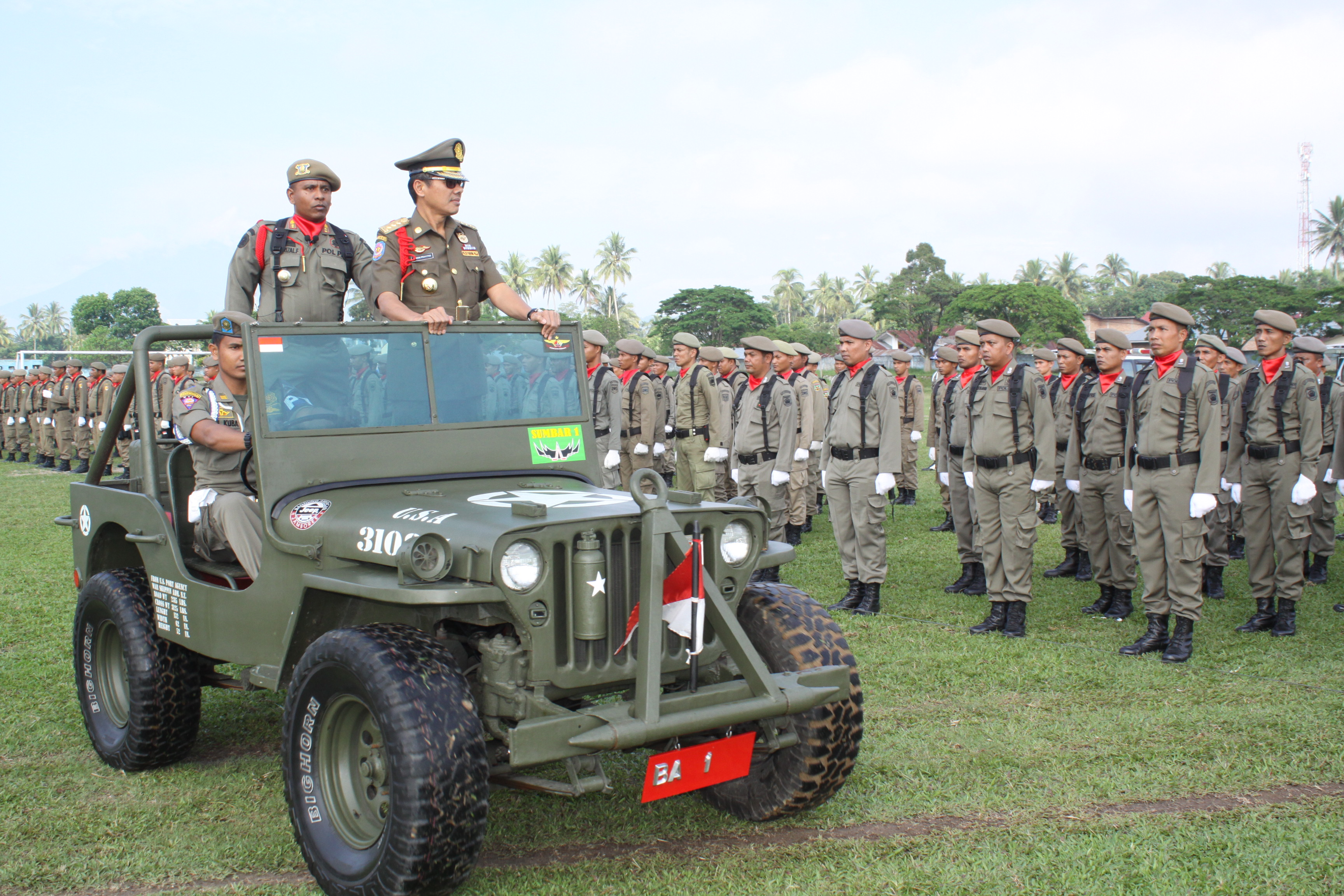 Gubernur Sumatera Barat Irwan Prayitno menjadi Inspektur Upacara dalam rangka Peringatan HUT Satuan Polisi Pamong Praja (Satpol PP) ke-66 dan Satuan Perlindungan Masyarakat ke-54 tahun 2016 dengan tema "Dengan semangat HUT Satuan Polisi Pamong Praja ke-66 dan HUT Satuan Perlindungan Masyarakat ke-54, kita wujudkan Polisi Praja dan Linmas yang Humanis, Berdedikasi, Disiplin dan Tegas". Upacara ini dilaksanakan di Lapangan Pacuan Kuda Kubu Gadang Kota Payakumbuh dan seluruh rangkaian kegiatan dari perayaan HUT Satpol PP ini juga dipusatkan di kota Payakumbuh.